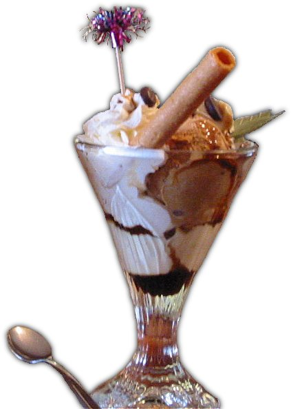 Une coupe glacée d'un café liégeois